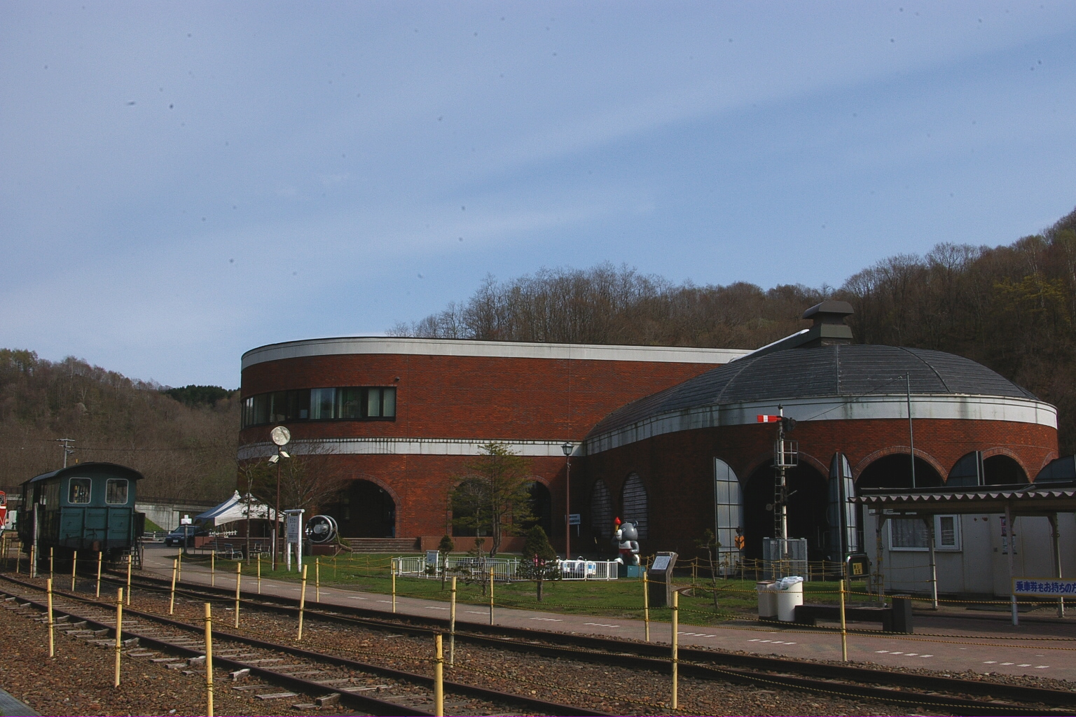 Mikasa railroad memorial hall.